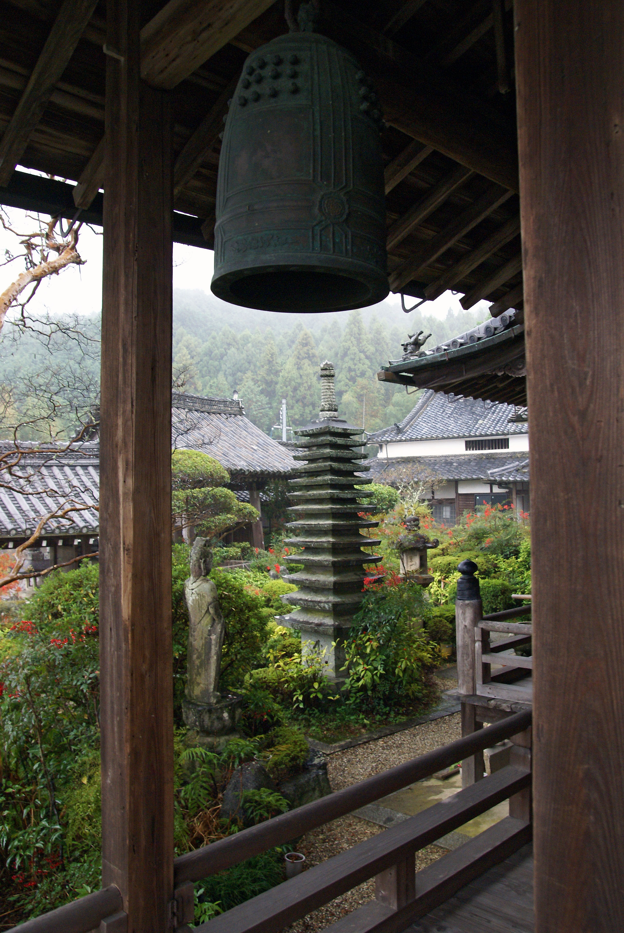 Shorin-ji in Sakurai, Nara, Japan